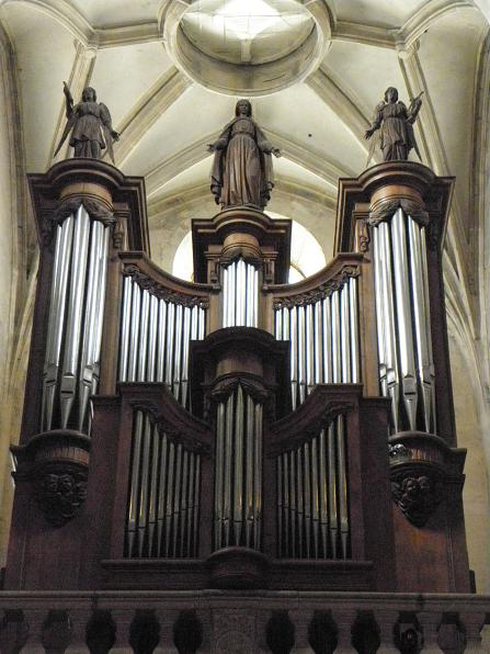 Grandes-orgues de la Co-cathédrale N.D. de Bourg en Bresse (01)